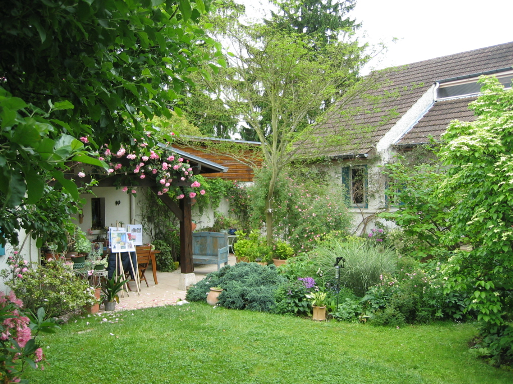 Jardin botanique à la Faulx de Dole en Franche Comté - France